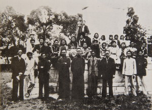 方幹民潘天壽